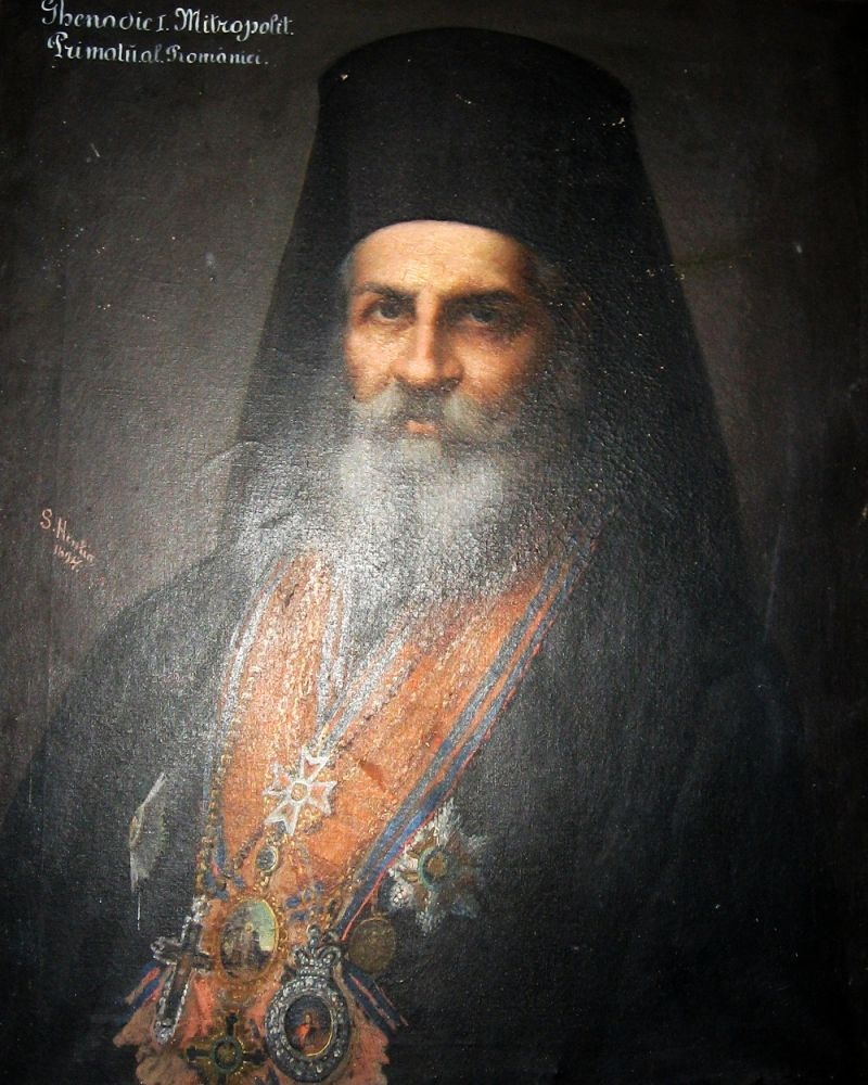 Portretul Mitropolitului Ghenadie Petrescu aflat la Muzeul de la Mănăstirea Căldărușani.